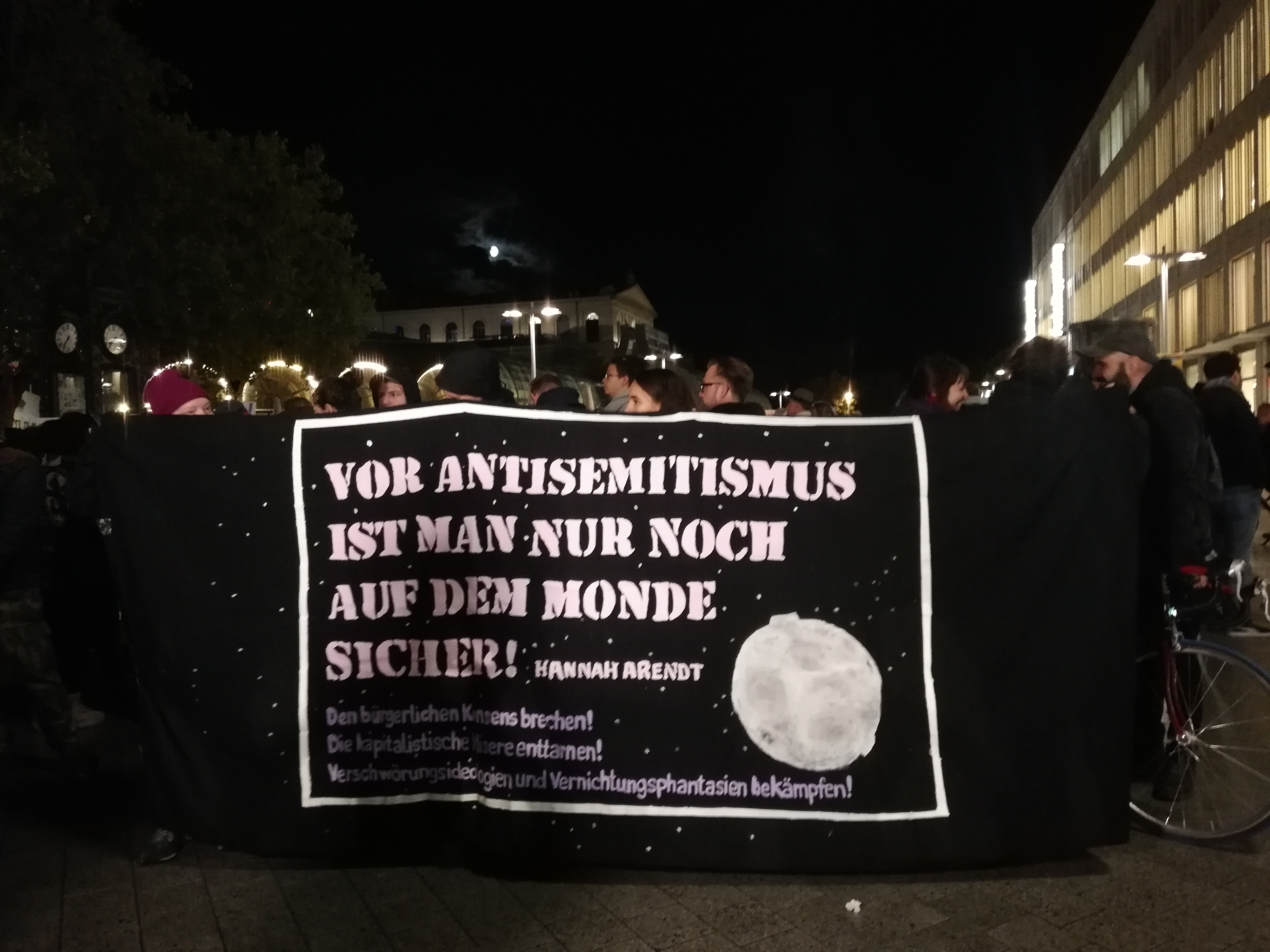 In Hannover beteiligten sich hunderte von Menschen am 10. Oktober 2019, einen Tag nach dem Anschlag in Halle , an einer Mahnwache gegen Antisemitismus ...